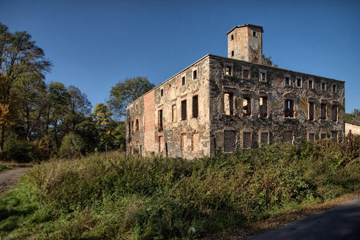 Pisarzowice Pałac von Schreibersdorf